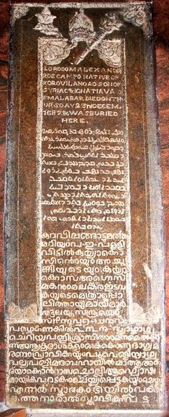 Bischof Alexander de Campo, Grabplatte in der Wallfahrtskirche Kuruvilangad, Kerala